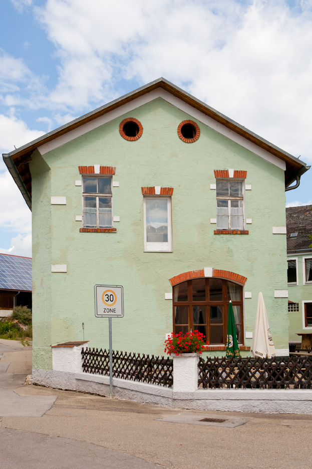 Gaststätte Röhrl, Eilsbrunn: Anbau Saaltrakt, Westseite